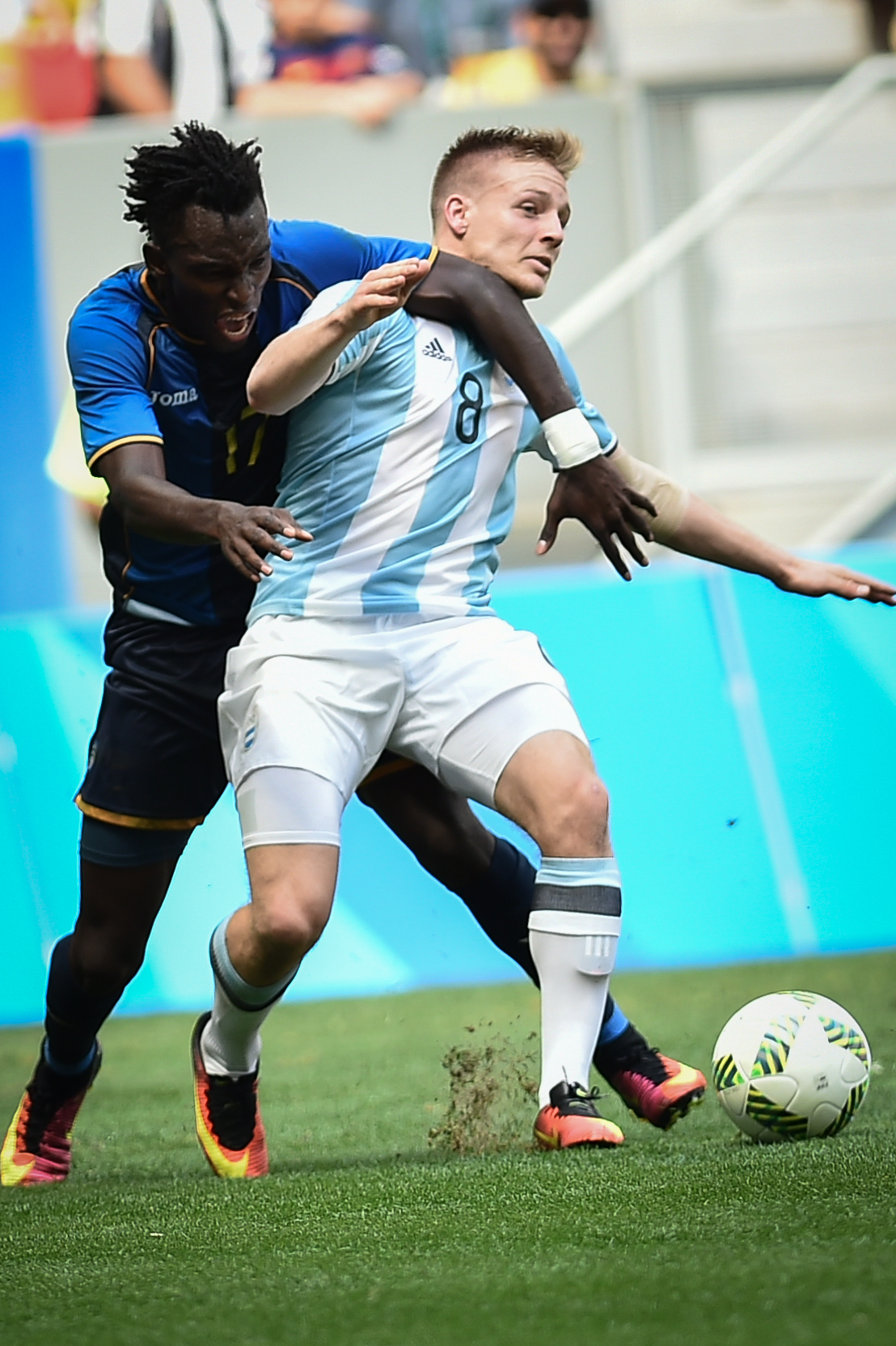 En la foto, el jugador argentino es Santiago Ascacibar. Estádio Nacional de Brasília Mané Garrincha, Brasília, DF, Brasil, 10/8/2016 Foto: Andre Borges/Agência Brasília Argentina e Honduras jogam nesta quarta-feira (10), no Estádio Mané Garrincha, pelo grupo D do futebol masculino nas Olimpíadas 2016.